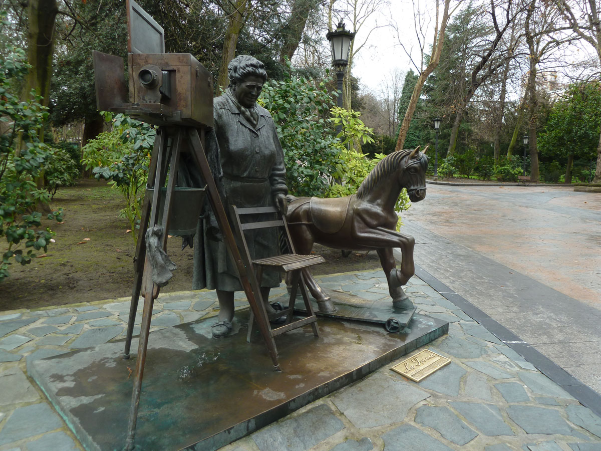 Oviedo